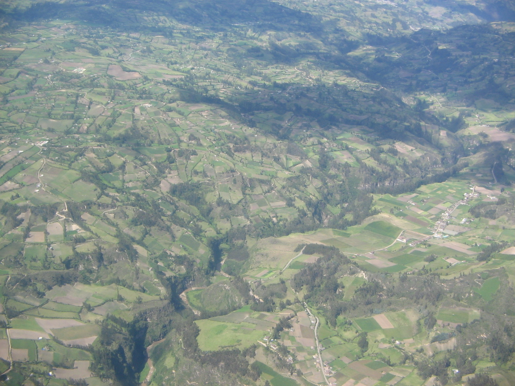 Foto Aerea de la Region de Ipiales